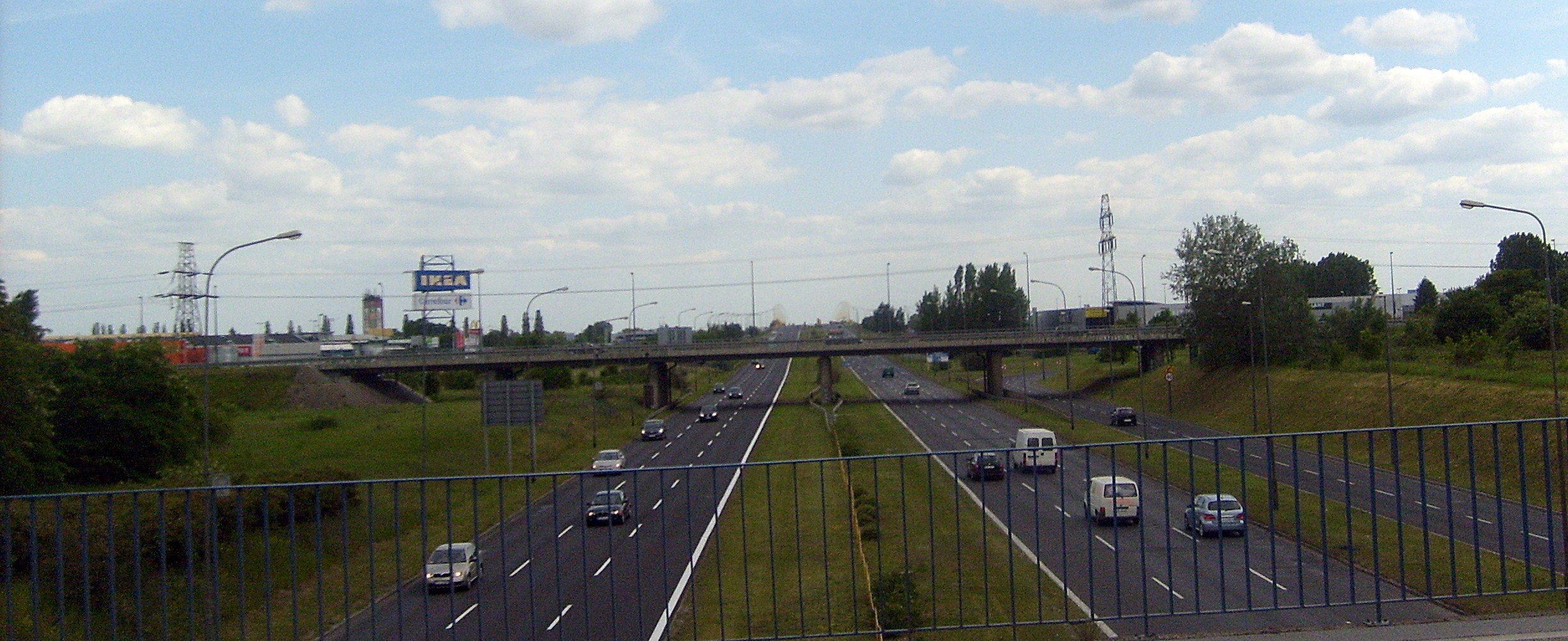 ul. Krzywoustego Poznań